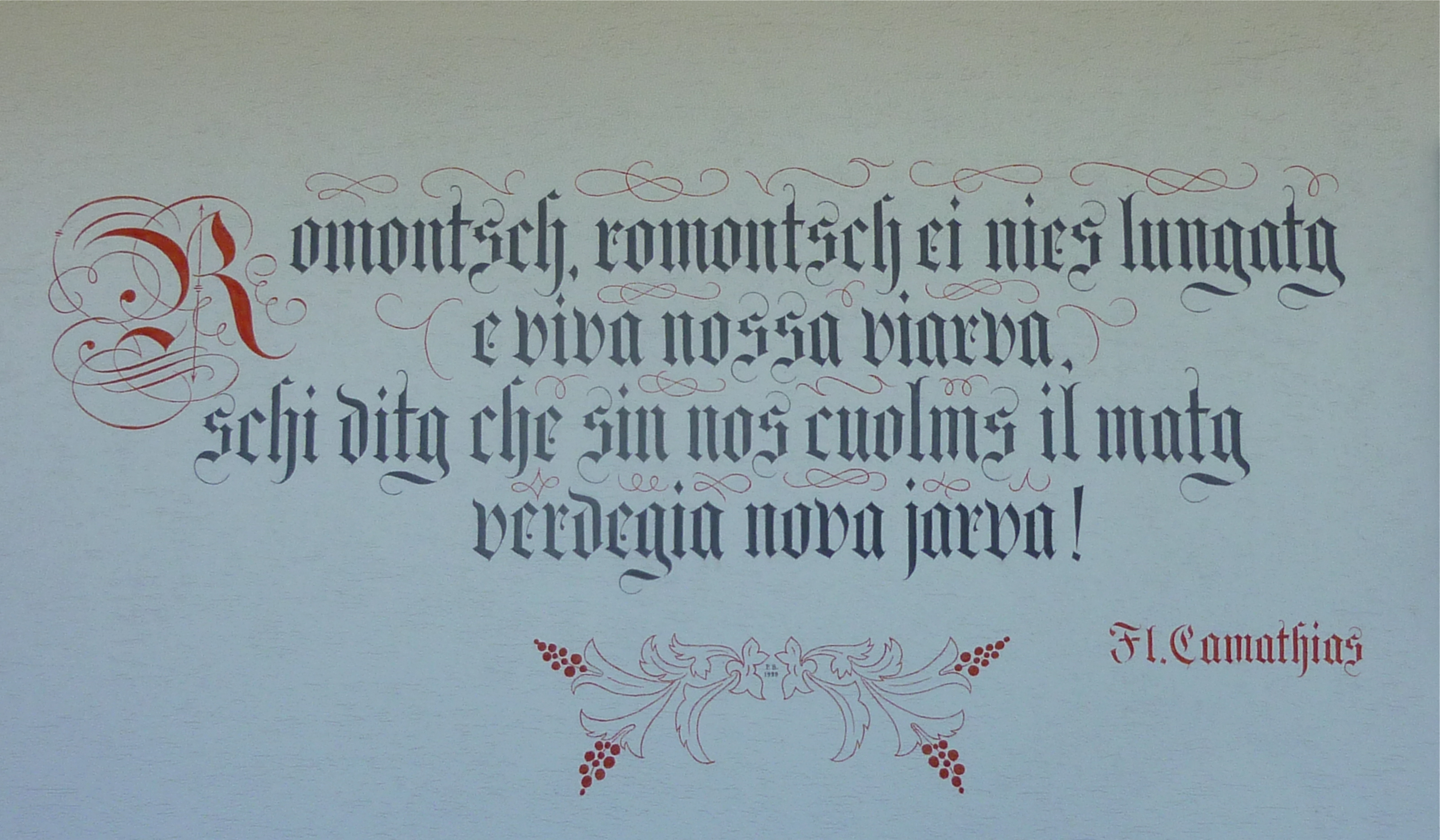 Rätoromanische Inschrift an einem Haus in Trun (Surselva) im Kanton Graubünden